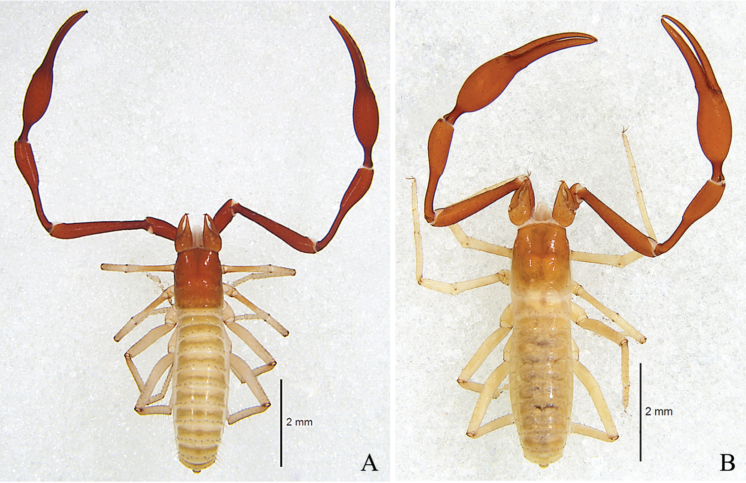 Figure 11; Parobisium sanlouense sp. nov. A Holotype male, dorsal view B Paratype female, dorsal view.